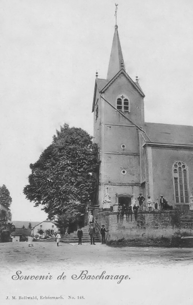 Déi al Kierch vun Nidderkäerjeng. Foto vum J.M. Bellwald, N° 148. (D'Bild ass liicht retouchéiert a vergréissert)